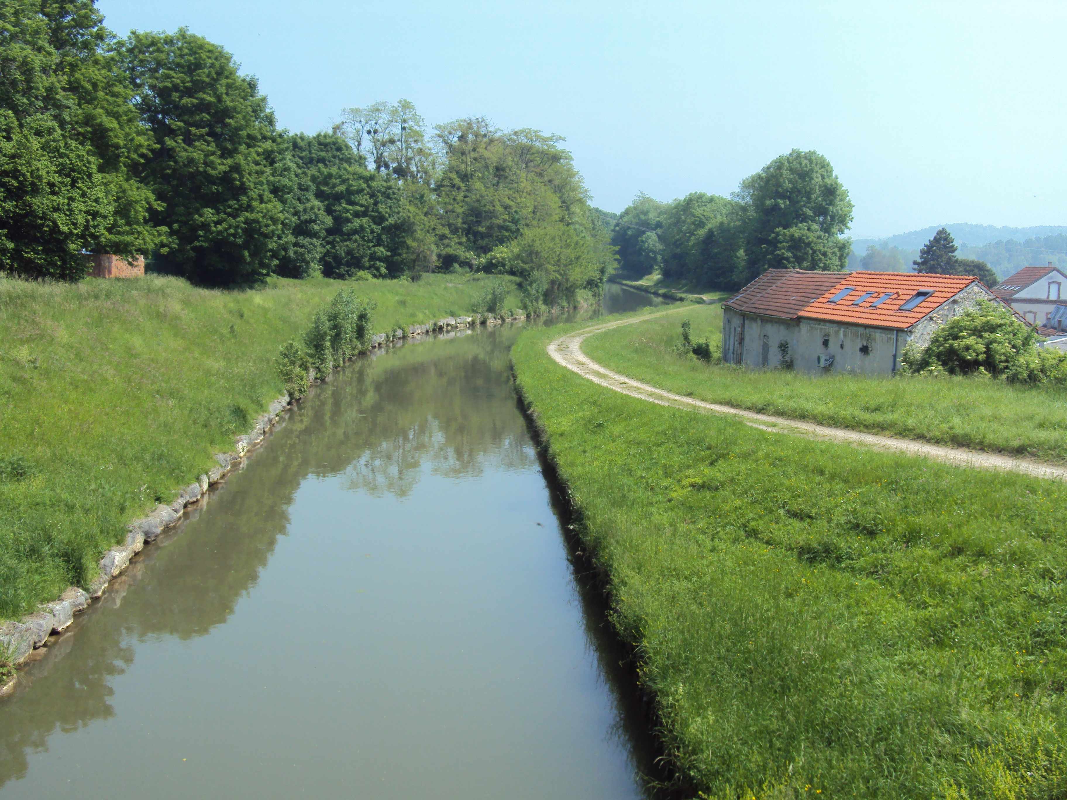 Le canal de l'Ourcq a Lizy-sur-Ourcq vu en direction de l'Est